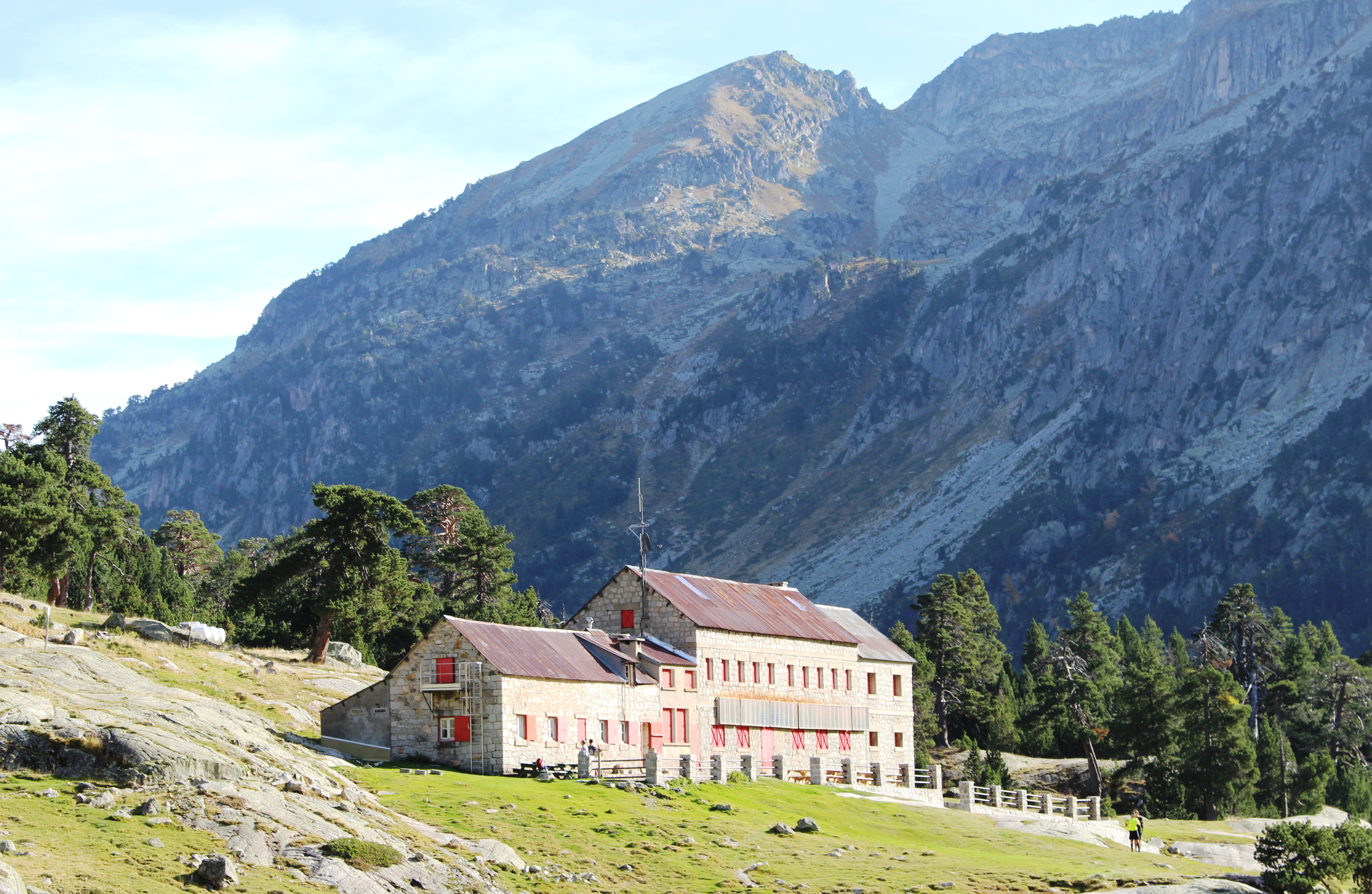 Refuge Wallon (Hautes-Pyrénées)